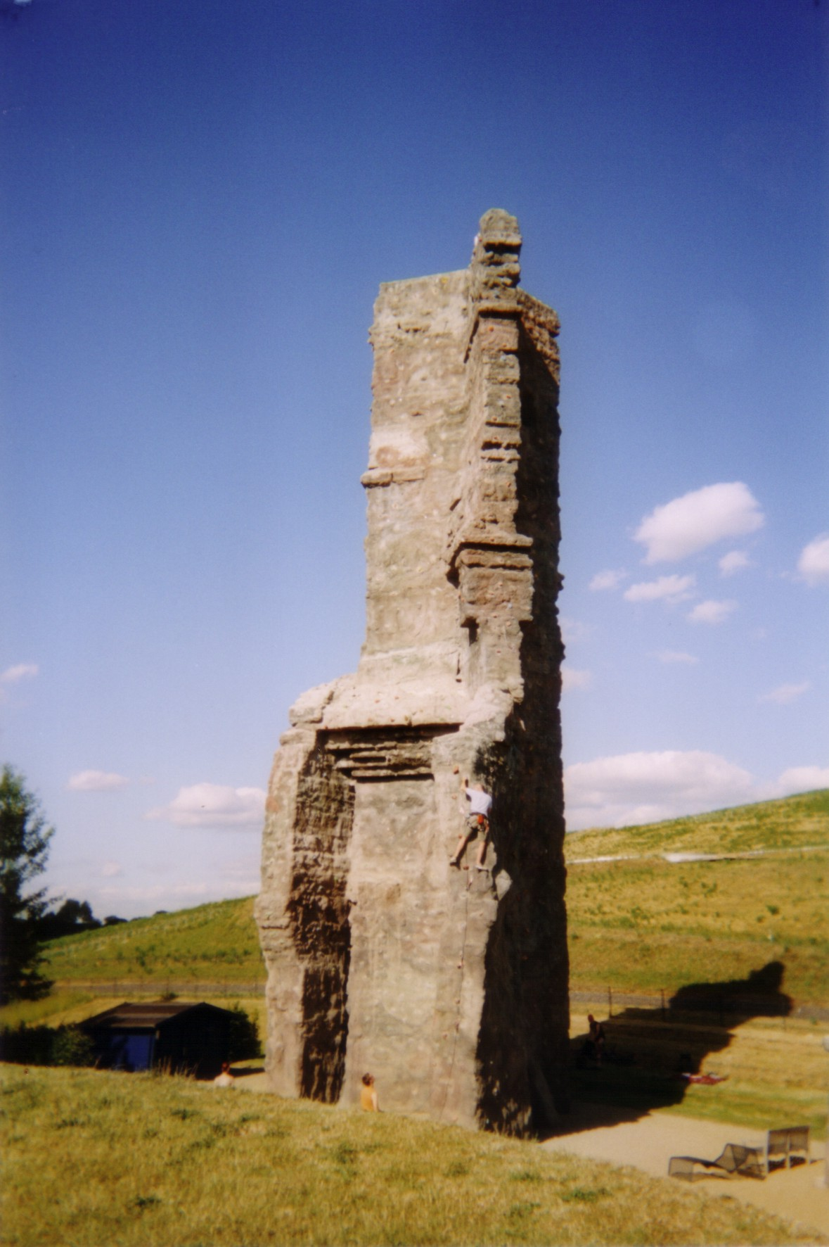 Der große Angerfelsen im Elbauenpark in Magdeburg